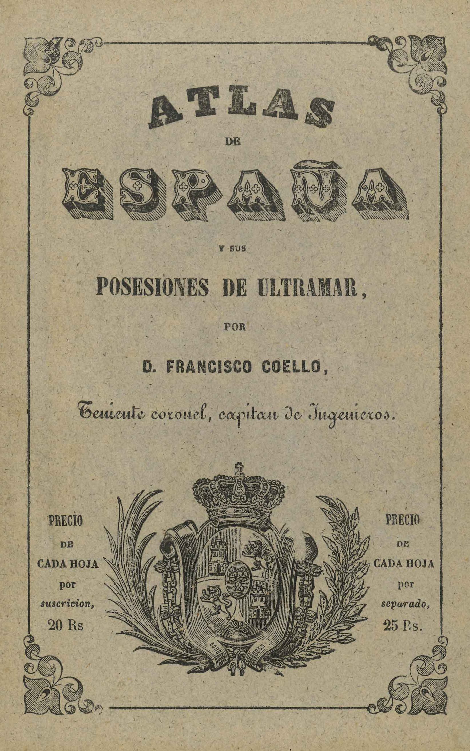 Portada del libro "Atlas de España y sus posesiones de ultramar". Colección de 46 láminas publicada por Francisco Coello en Madrid, entre 1847 y 1870.[1]